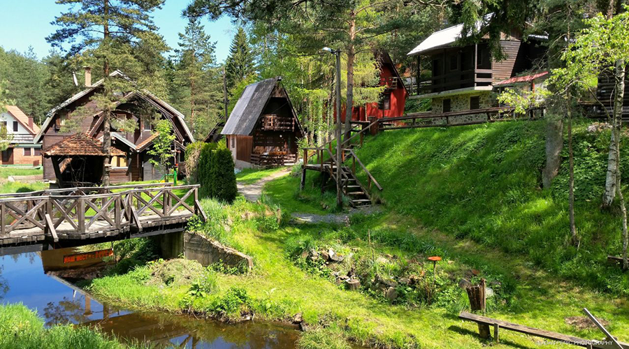 Ваздушна бања